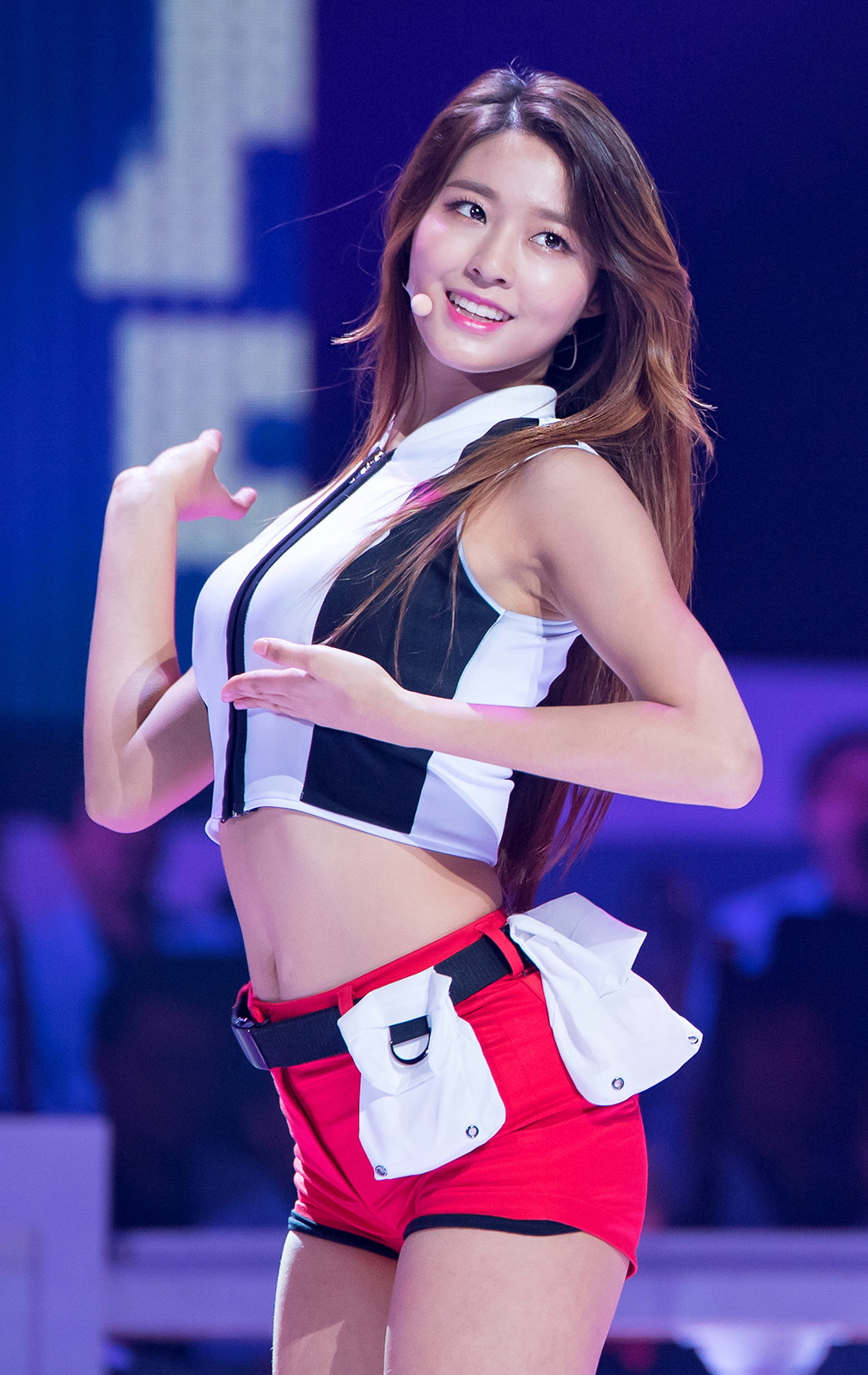 [16.05.24] KBS 1TV 열린음악회 AOA